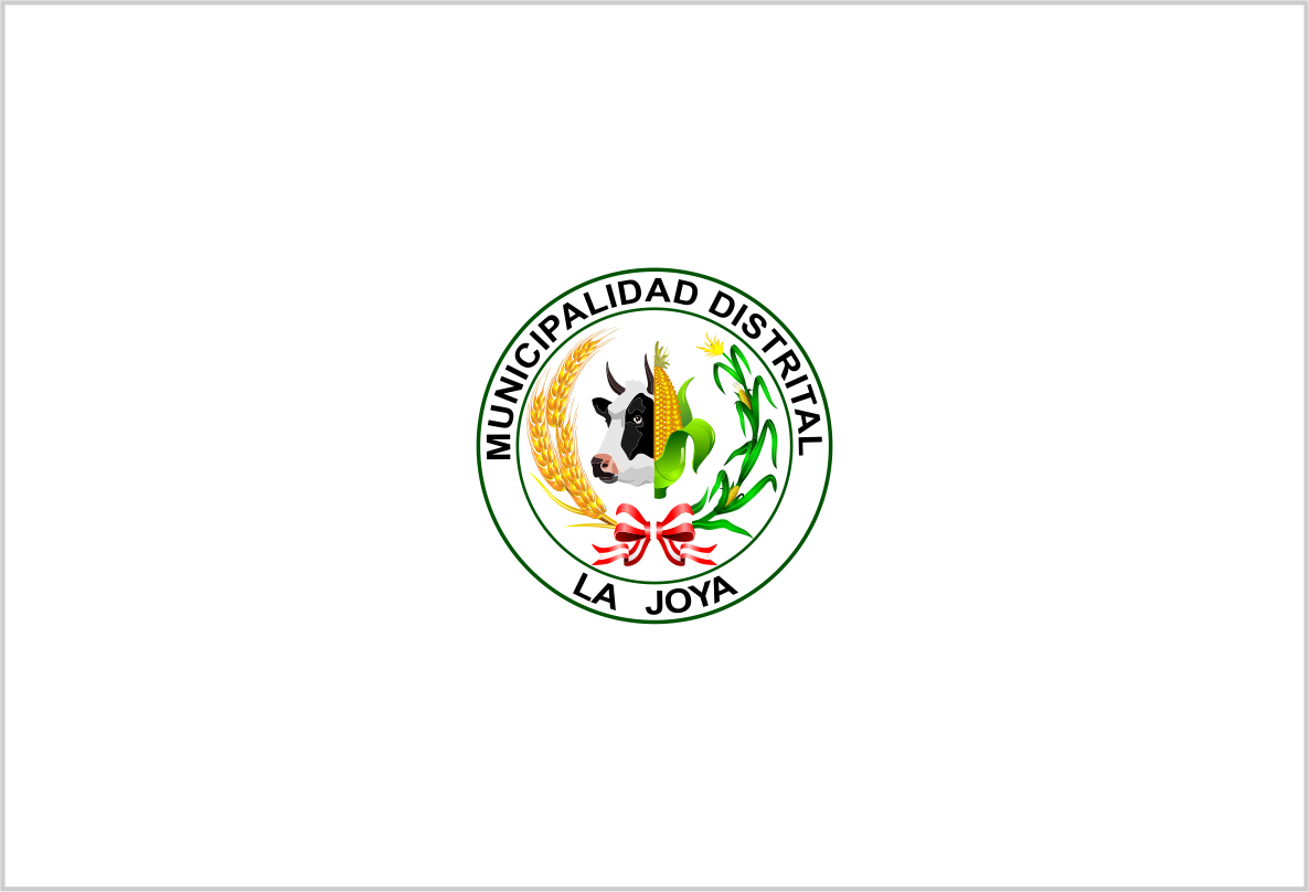 Distrito de La Joya - Provincia de Arequipa - Región Arequipa